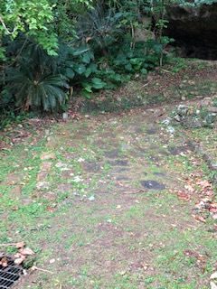 2019年2月4日 沖縄県恩納村 仲泊遺跡第三貝塚前の石畳道